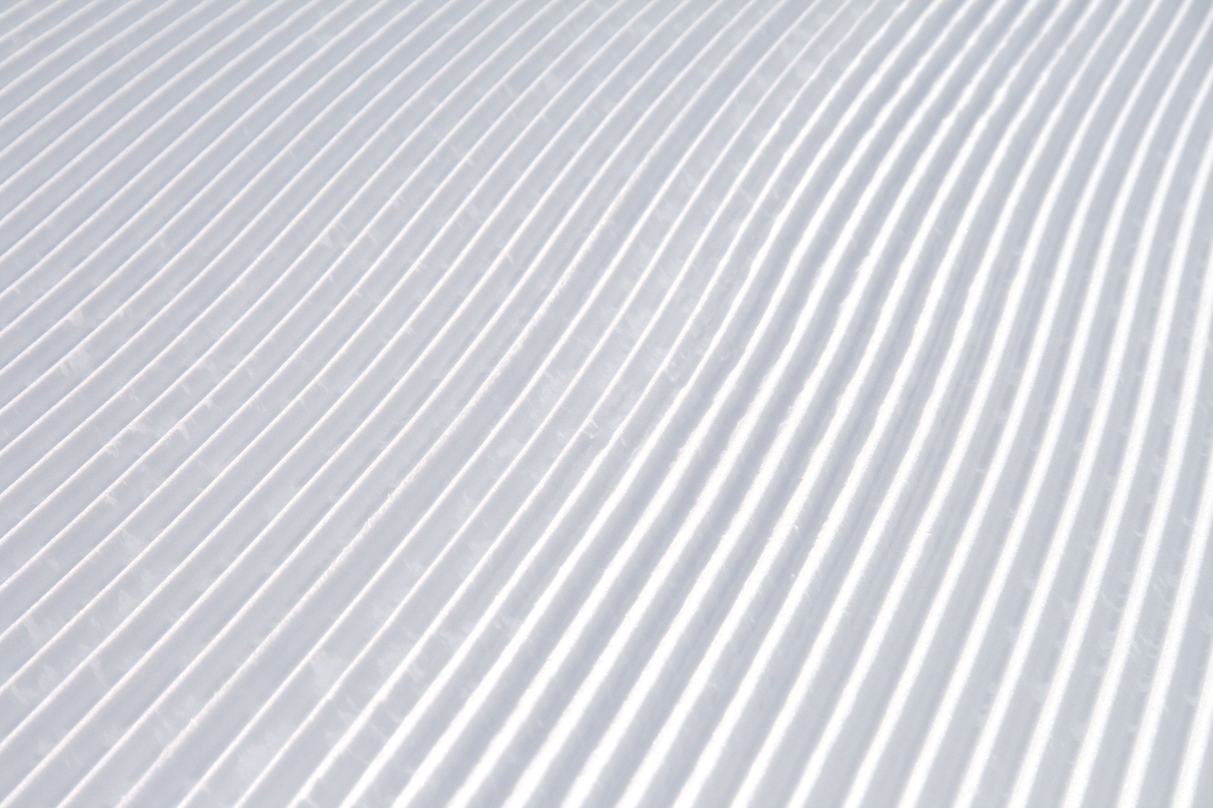 Schneeprofil einer Pistenraupenwalze auf einer frisch präparierten Skipiste in Vorarlberg.